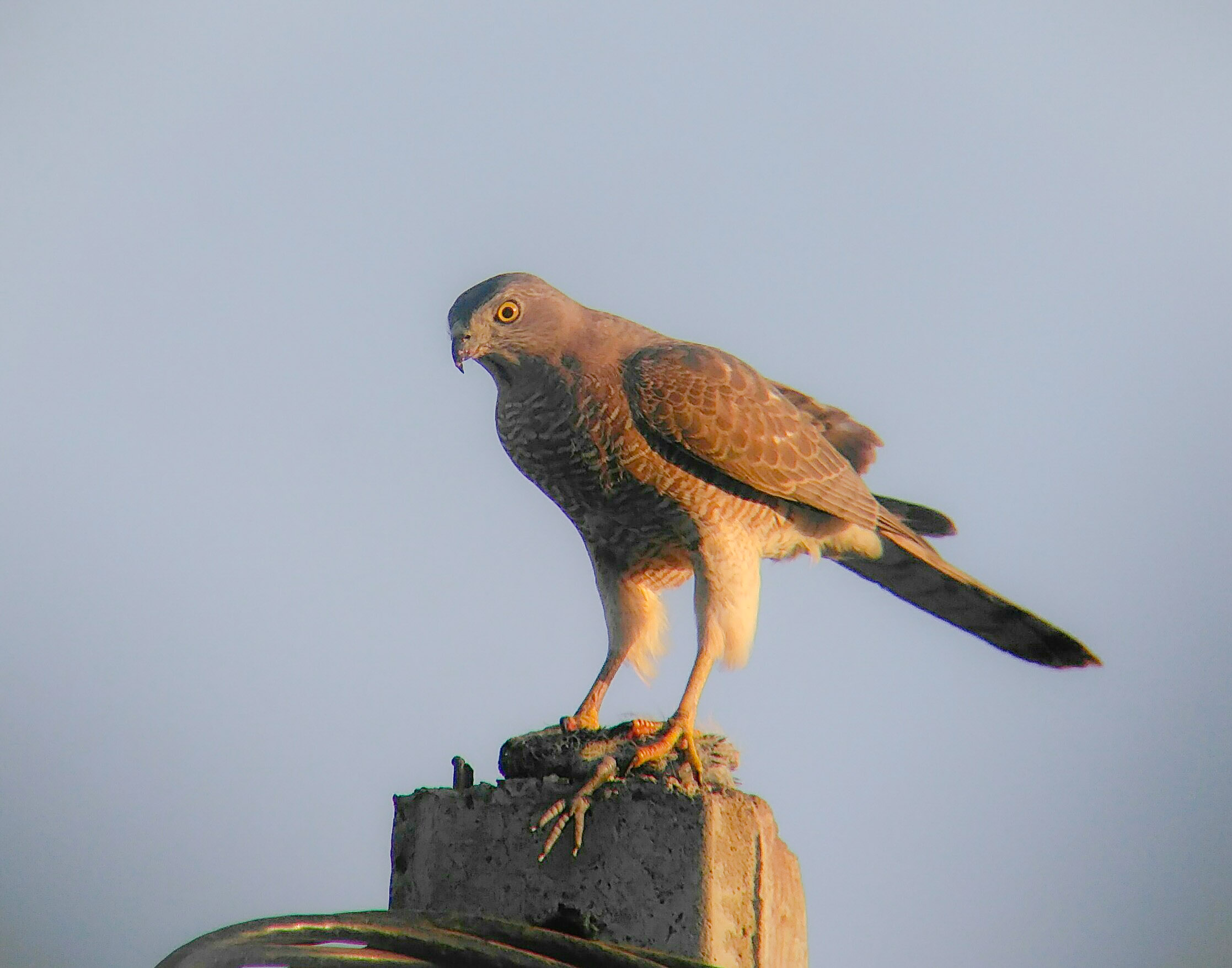 on kill